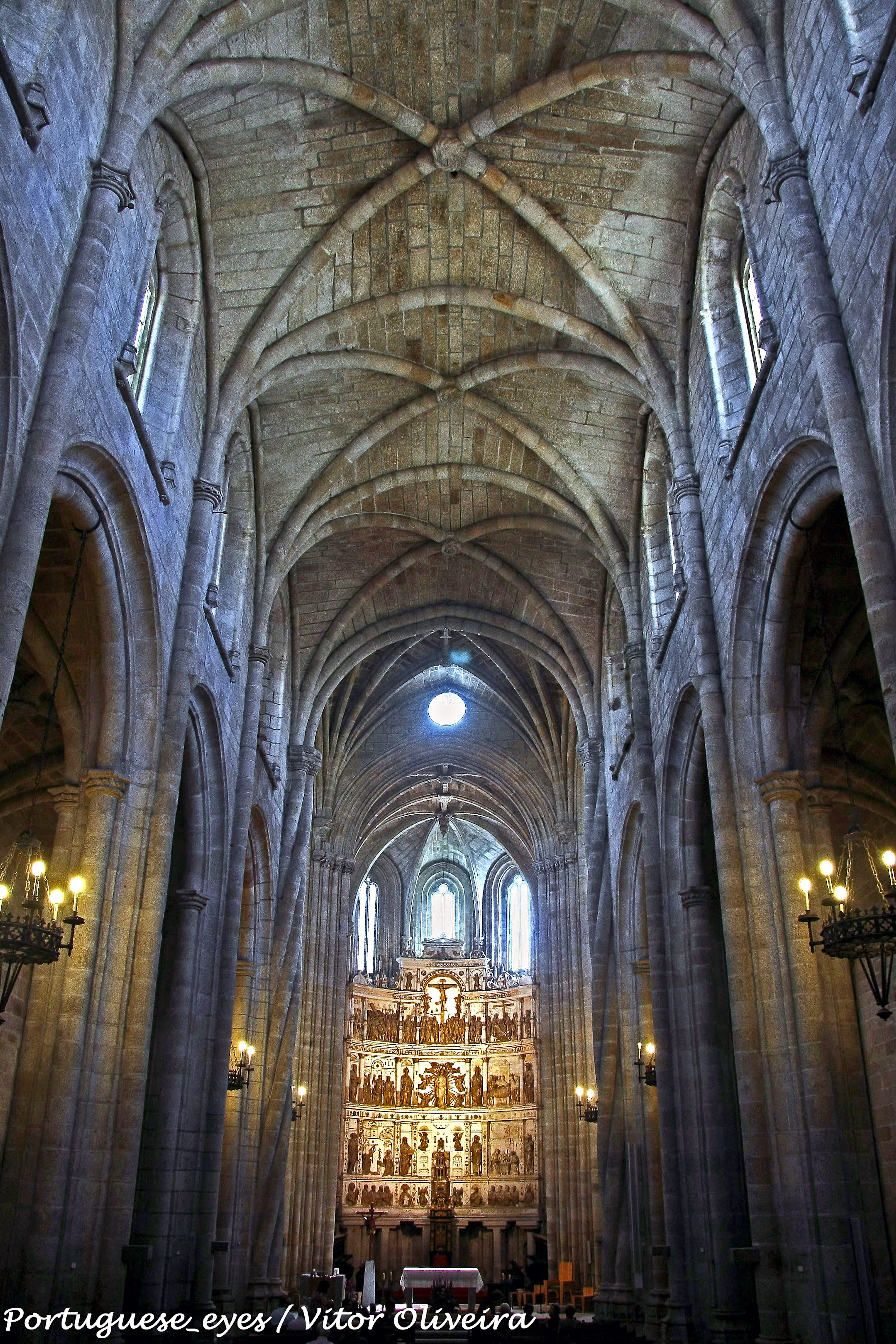 A Sé-Catedral da Guarda foi erguida no seguimento do pedido de D. Sancho I ao Papa Inocêncio III para transferir a diocese da Egitânia para a nova cidade da Guarda. Da original construção, de estilo românico, nada resta. Foram, no entanto, encontrados alguns vestígios que apontam para um edifício simples. Seria mandada construir por D. Sancho II uma segunda catedral, no local onde se situa a actual Igreja da Misericórdia, concluída no século XIV, mas mais tarde destruída aquando da reforma fernandina das muralhas, por se situar fora delas. A construção da actual Sé da Guarda remonta aos finais do século XIV, já no reinado de João I de Portugal — D. Fernando teria falhado na promessa de erguer novo templo —, por iniciativa do bispo Vasco de Lamego, partidário da casa de Avis durante a crise dinástica. As obras arrastaram-se lentamente e só no reinado de D. João III seriam concluídas, já em pleno século XVI, sendo por isso um dos monumentos portugueses dos últimos tempos do gótico, com evidências claras da influência manuelina. A história da catedral teve um período importante na sua conservação, na viragem para o século XIX: em 1898 coube ao arquitecto Rosendo Carvalheira o restauro do edifício, executando aqui um dos mais importantes projectos de restauro revivalista, pelo que é notável o estado de conservação da catedral. See where this picture was taken. [?]